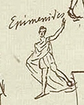 Ausschnitt aus dem Kunzschen Riss, den E. T. A. Hoffmann 1815 an seinen Bamberger Verleger Kunz schickte